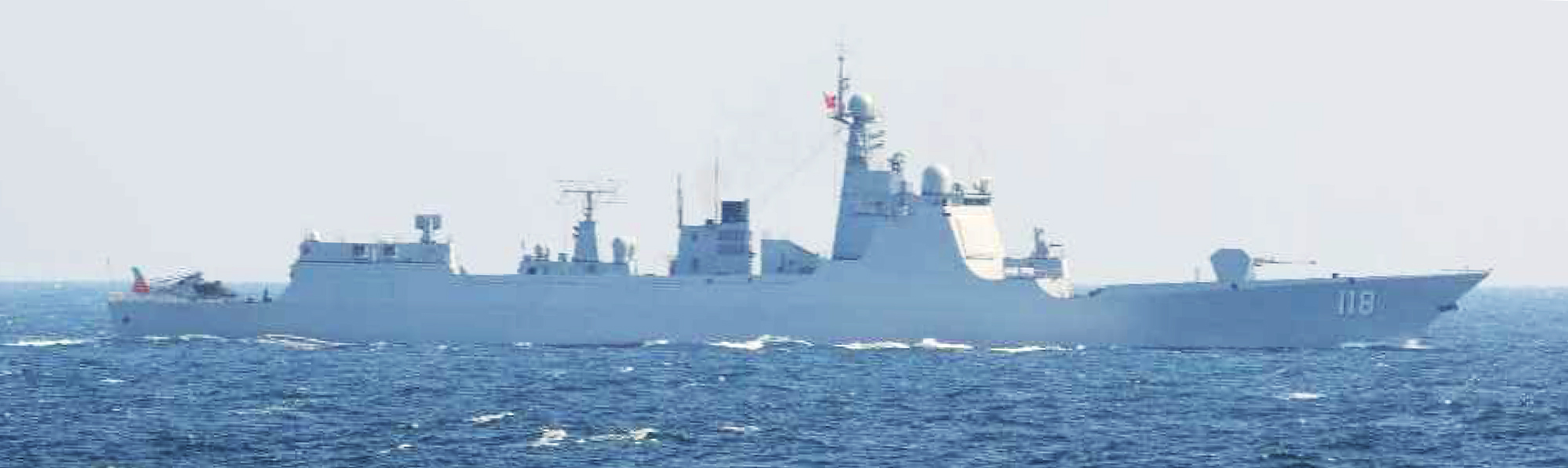 ２月２３日（土）午後９時頃、海上自衛隊第１４護衛隊所属「せんだい」（舞 鶴）が、上対馬の東北東約１１０ｋｍの海域を南西進するルーヤンⅢ級ミサイ ル駆逐艦１隻及びジャンカイⅡ級フリゲート２隻を確認した。 その後、これらの艦艇が対馬海峡を南下し、東シナ海に向けて航行したこと を確認した。 なお、これらの艦艇は、２月１６日（土）に対馬海峡を北上した艦艇と同一 である。